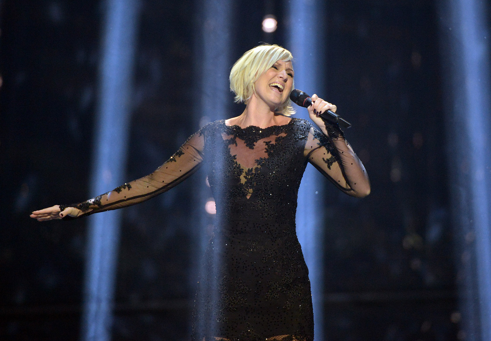 Sanna Nielsen under Eurovision Song Contest 2014.